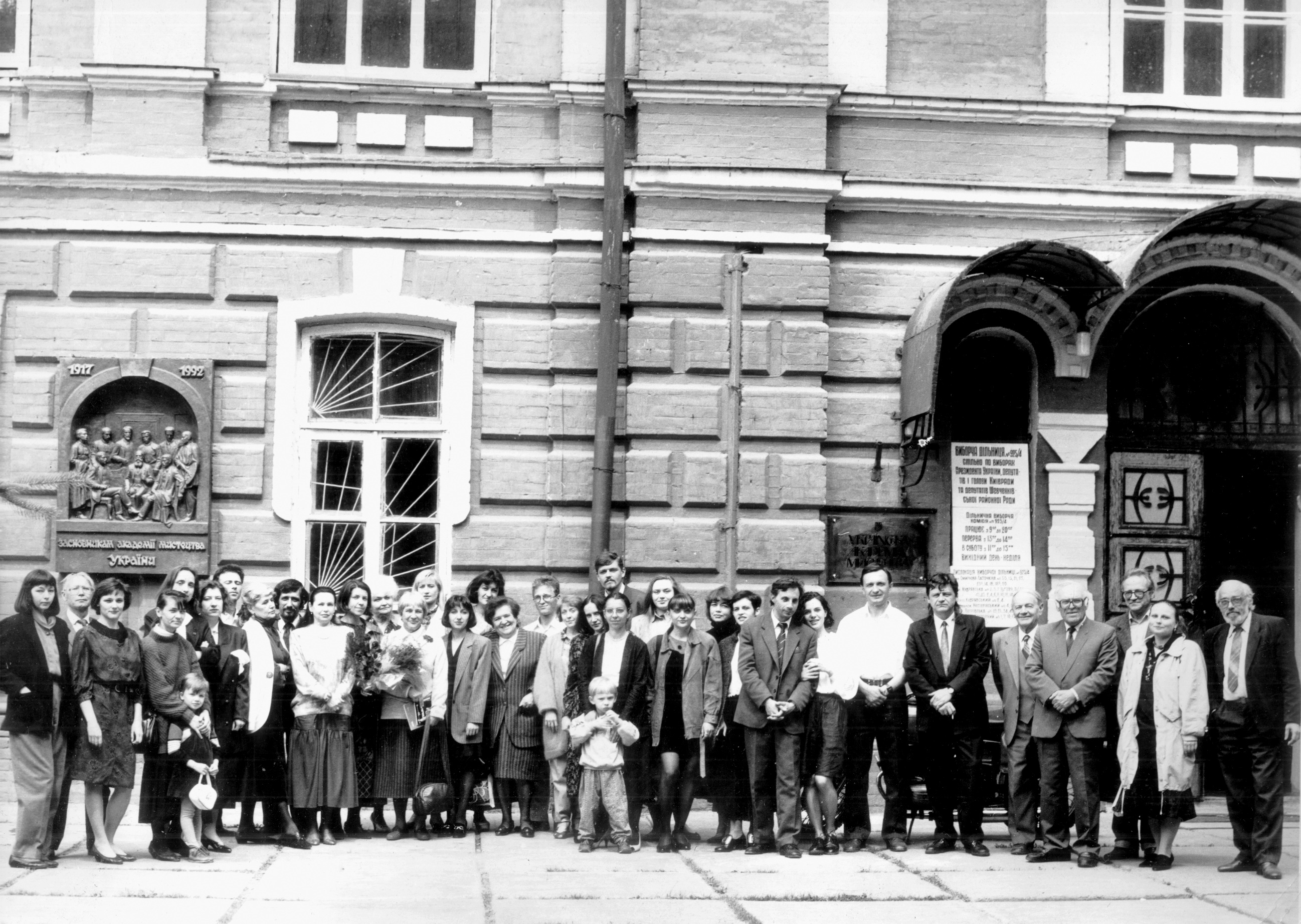 Graduates and lecturers of National Academy of Fine Arts and Architecture, in front of academy’s entrance. 1994Выпускники и преподаватели факультета теории и истории искусств Национальной академии изобразительного искусства и архитектуры, НАОМА перед входом в академию.Я.Хоменко;В.М.Клеваев(крайние справа).1994.